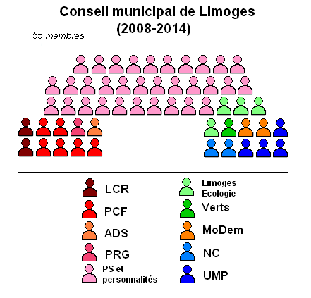 Composition du conseil municipal de Limoges, Haute-Vienne, France, élu en 2008